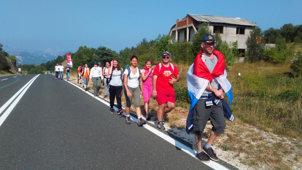 Hodočasnici Marijanskog zavjeta za Domovinu